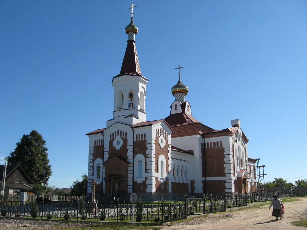 Зембін. Аднаўленне царквы